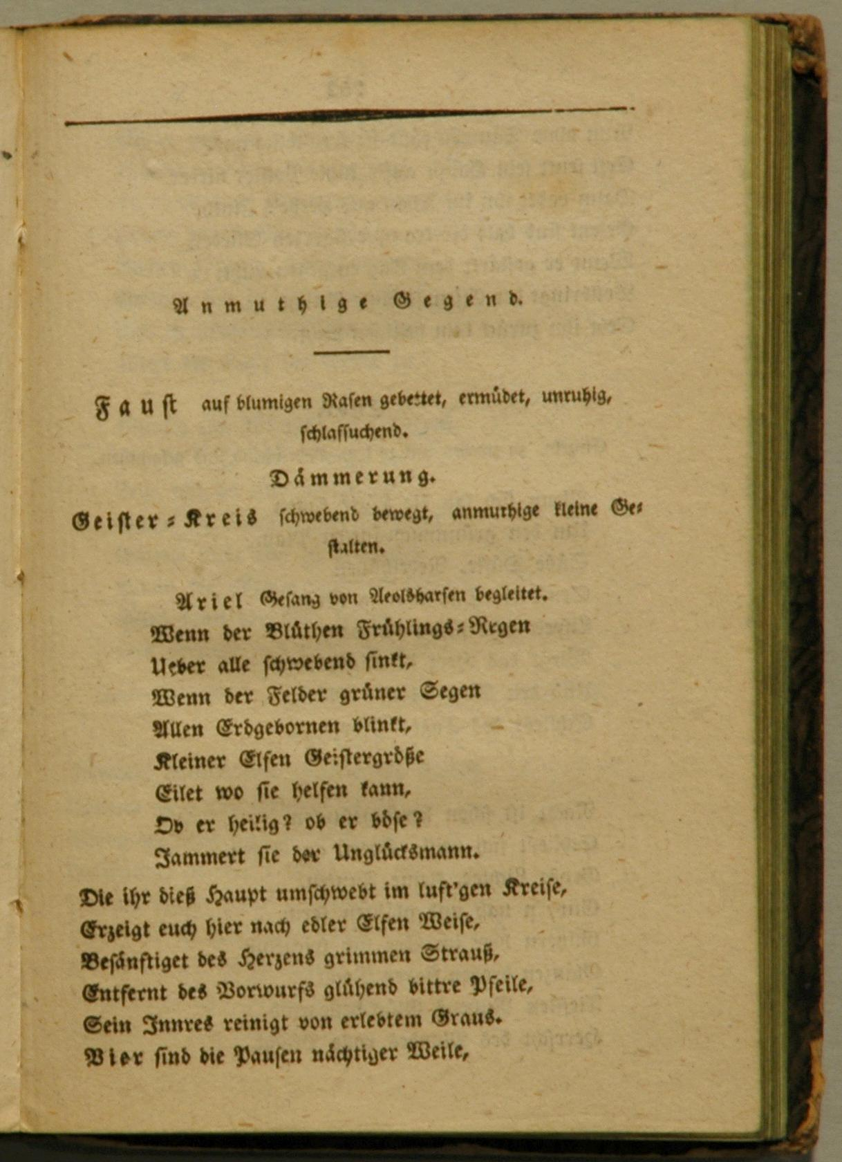 Vorabdruck des zu dieser Zeit noch nicht vollendeten Faust II in der Gesamtausgabe von Goethes Werken 1828. Die Veröffentlichung reicht bis Vers 6036 und endet mit der Unterschrift: «Ist fortzusetzen».